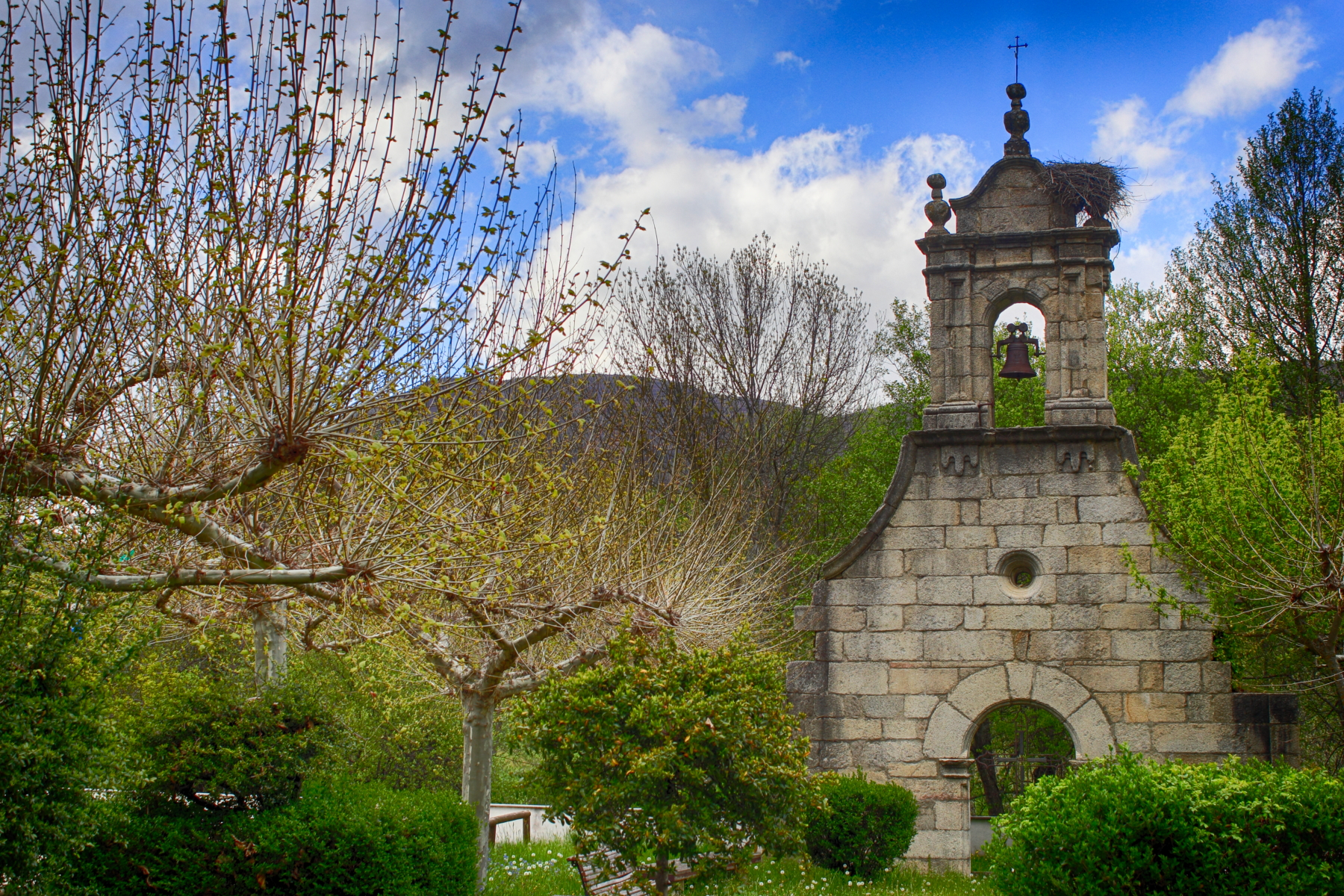 Portada de la Iglesia de Ribadelago, fue trasladada hasta aquí tras la catástrofe producida por la rotura del embalse de Vega de Tera el 9 de enero de 1959. Ribadelago Nuevo, municipio de Galende Provincia de Zamora Castilla y León España